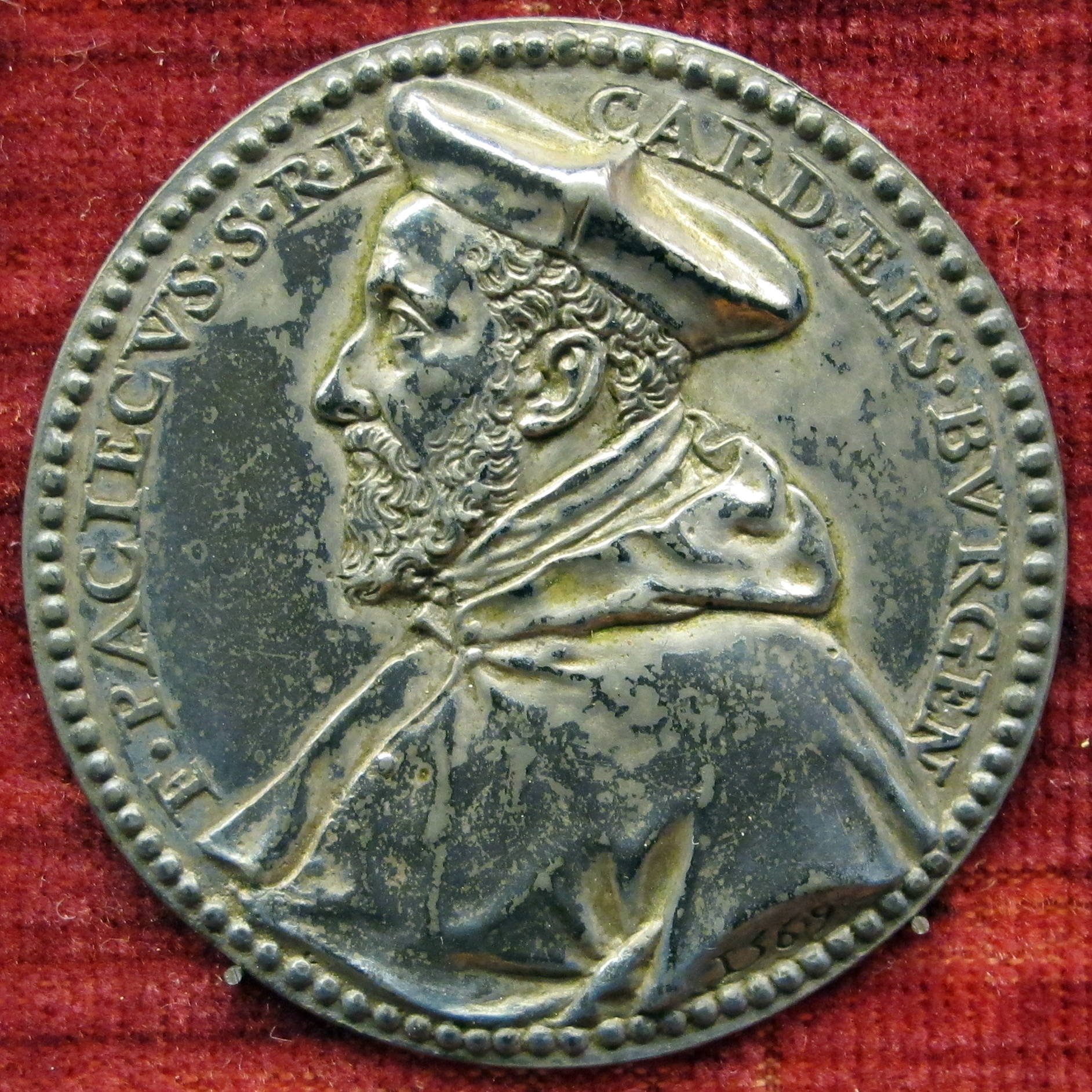 Medaglia di francesco pacheco, cardinale e vescovo di burgos (no verso), argento, 1569